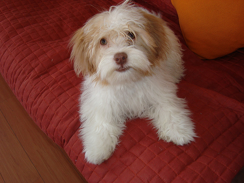 Perro